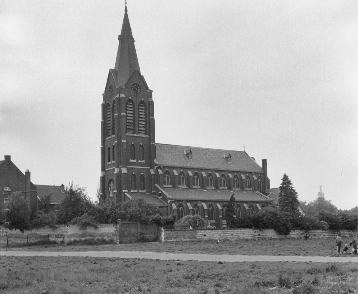 Sint-Petrus en Pauluskerk, Wolder, Maastricht.